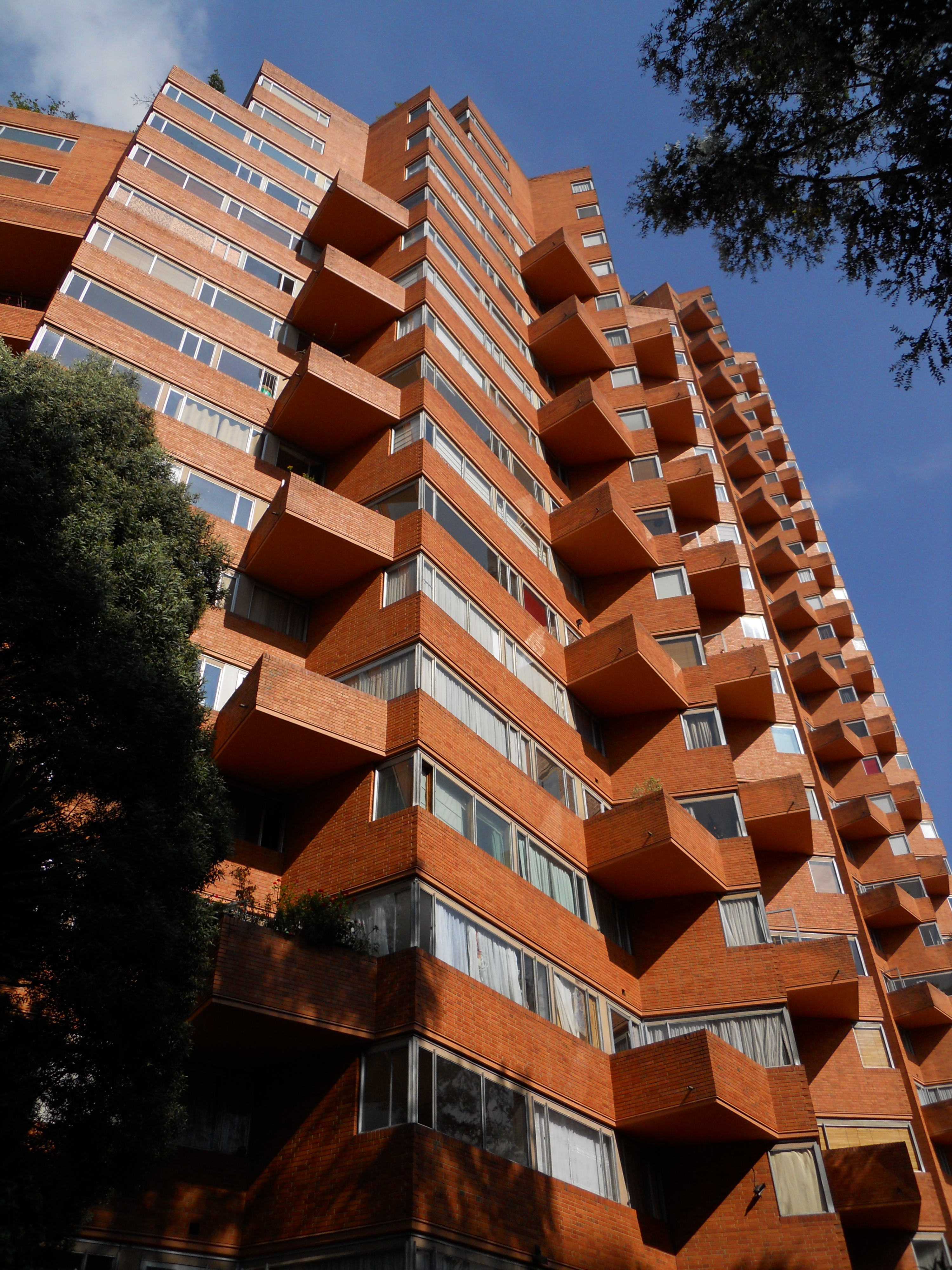 Torres del Parque. En primer plano la B, y la A confundida, a la derecha.